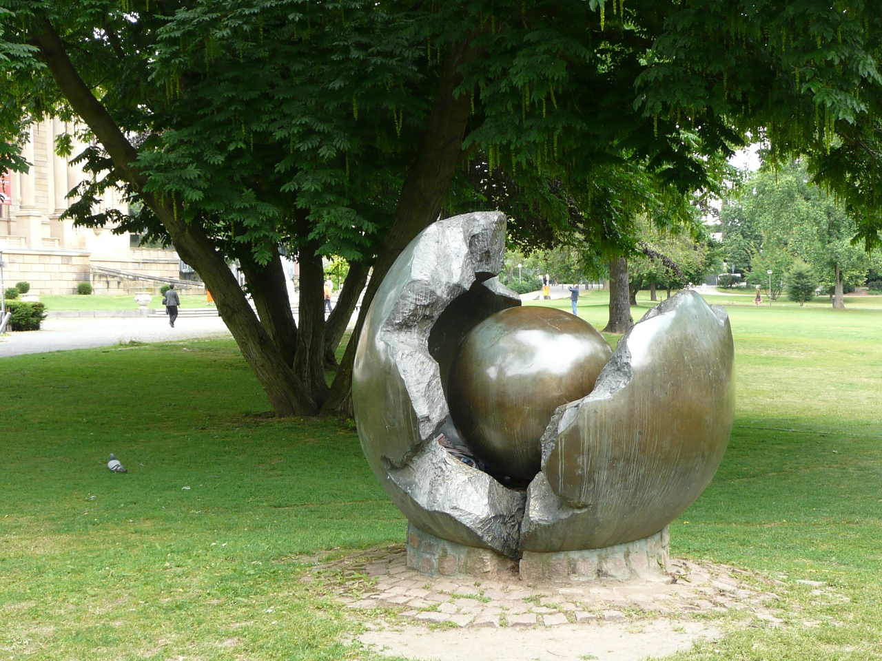 Sculpture in Wiesbaden/Germany